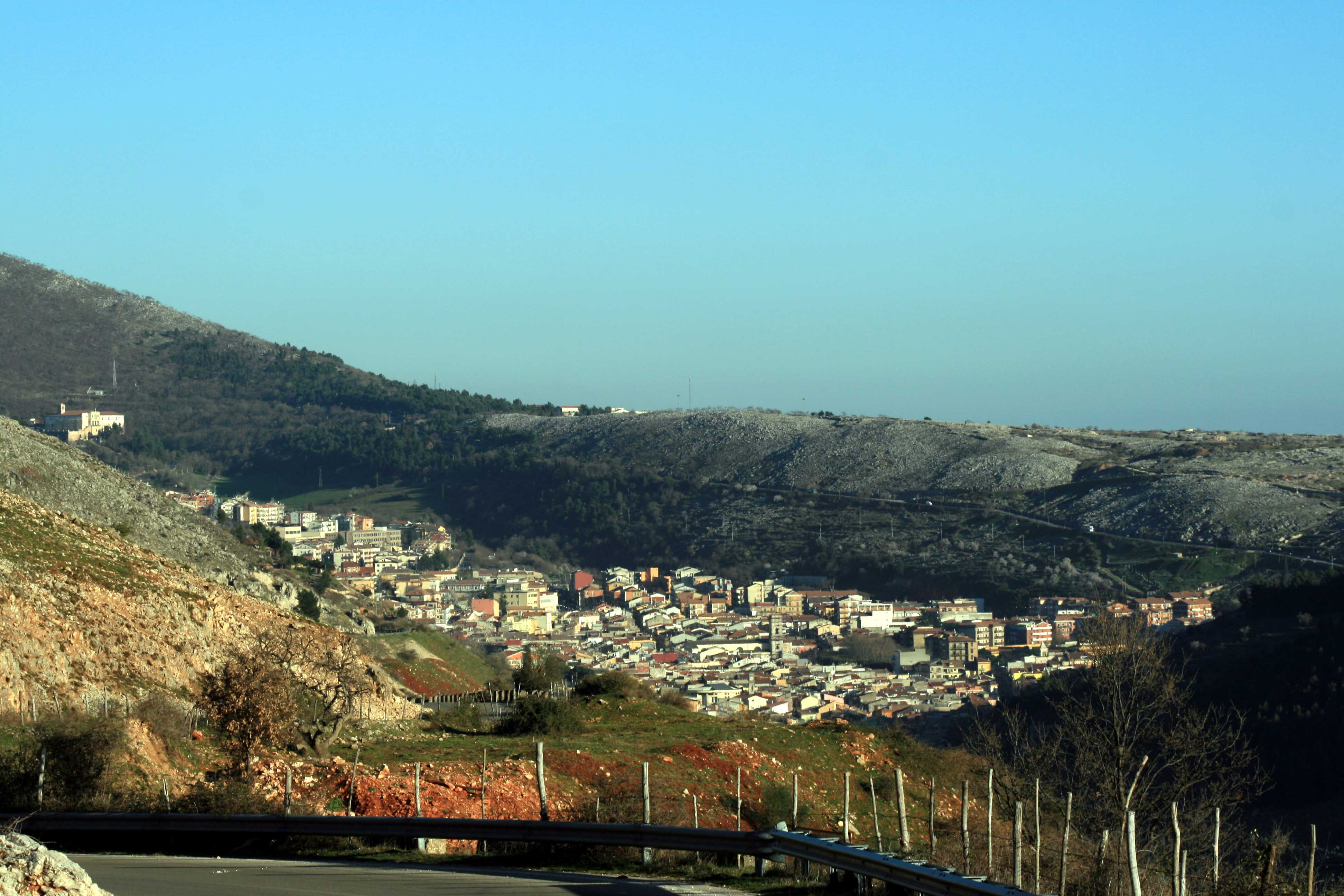 Panorama di San Marco in Lamis